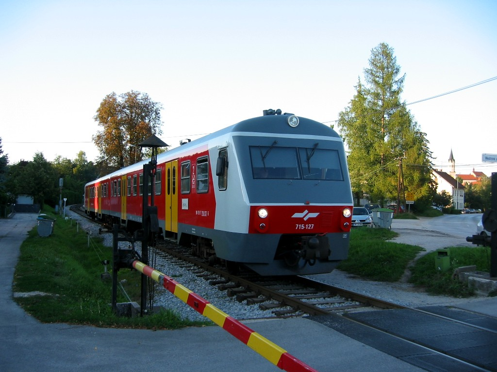 Motorni vlak Slovenskih železnic odhaja s postaje Kandija (v Novem mestu).